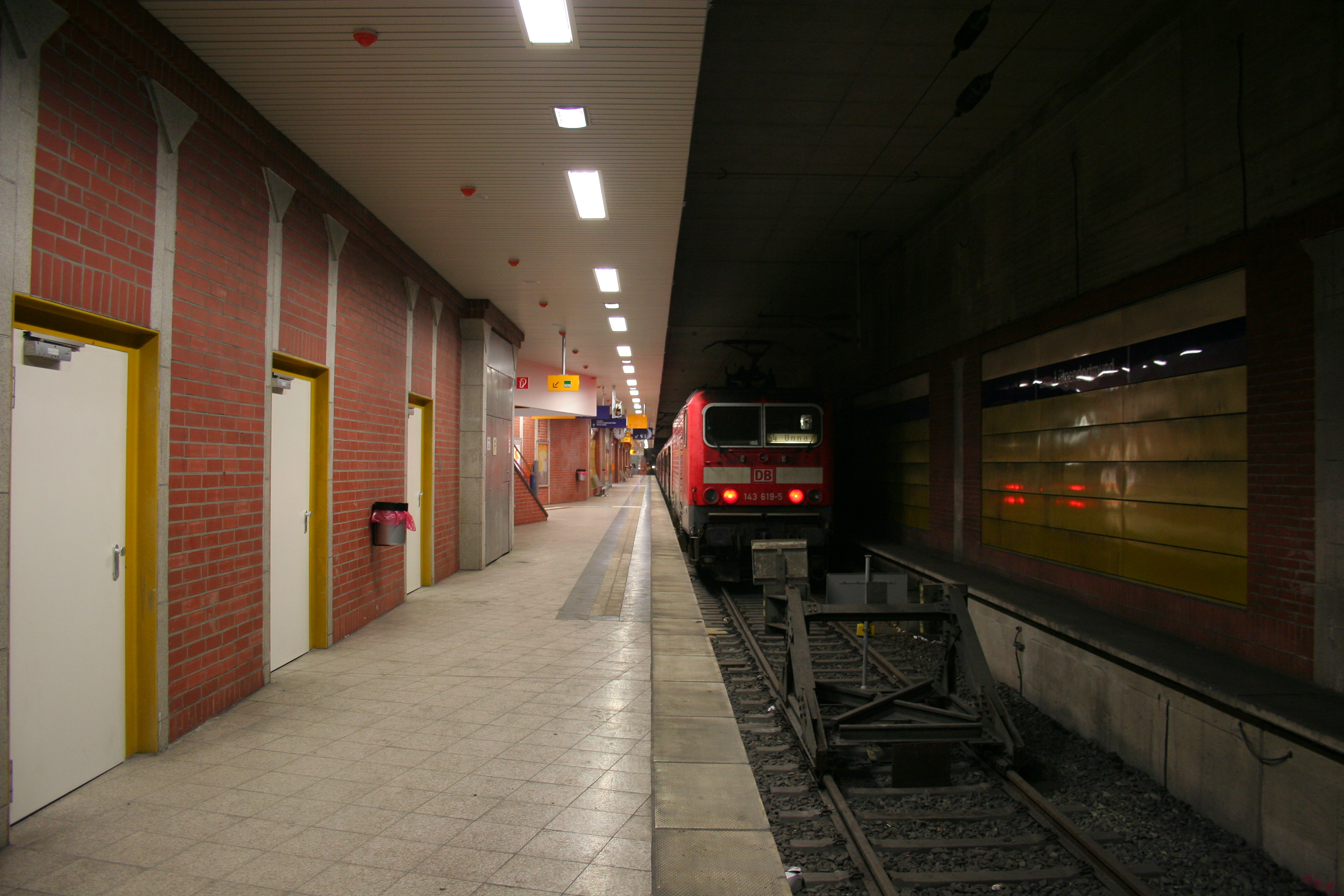 S-Bahnhalt Lütgendortmund in Dortmund. Unterirdischer Bahnsteig.